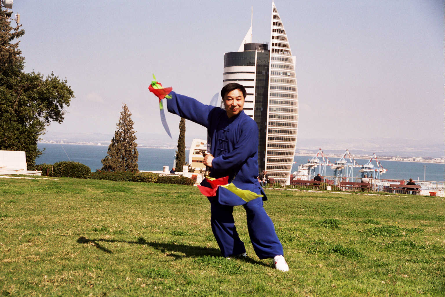 מאסטר סון מעיר חרבין